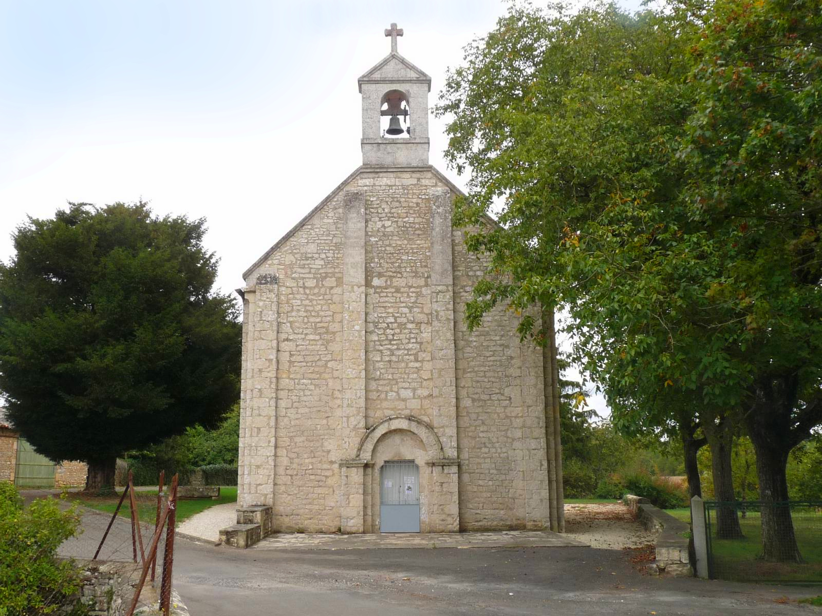 l'église de Taizé-Aizie, Charente, France